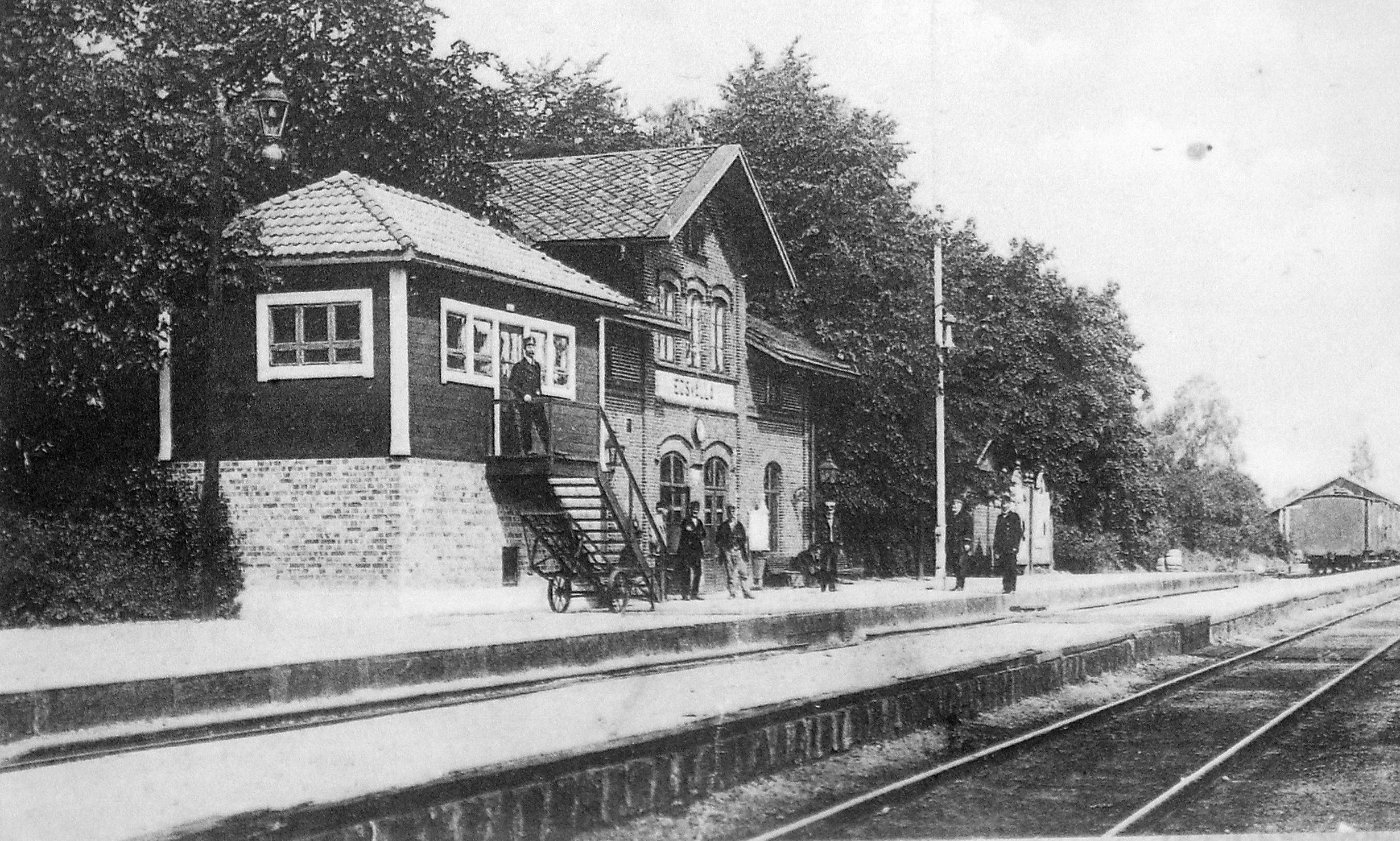 Järnvägstationen Edsvalla